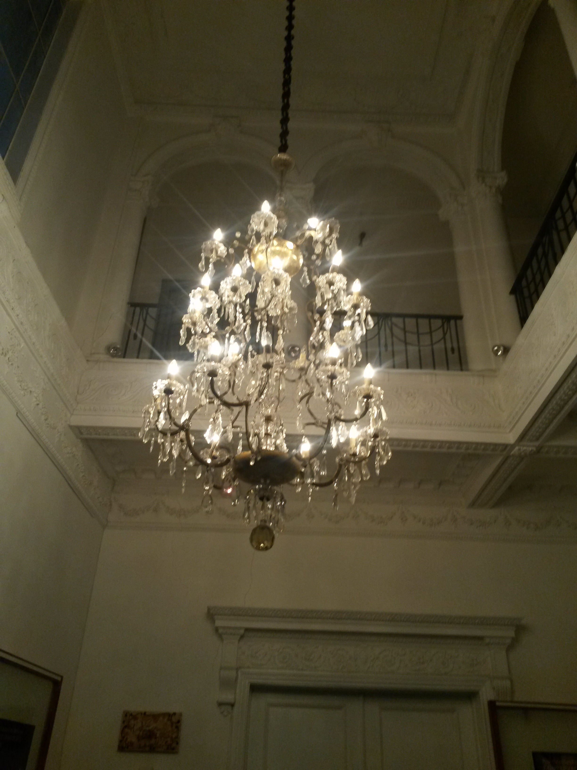 Lustre do Hall Principal da Residência da Família Jafet na Rua Costa Aguiar, 1013 em São Paulo (SP), Brasil